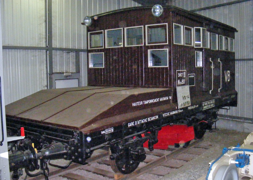 Chasse-neige Nsw 90-VB